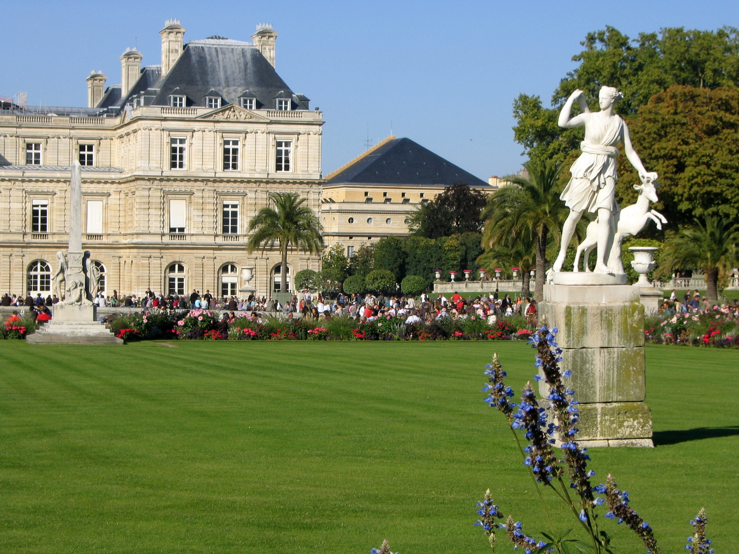 une statue dans le jardin du luxembourg